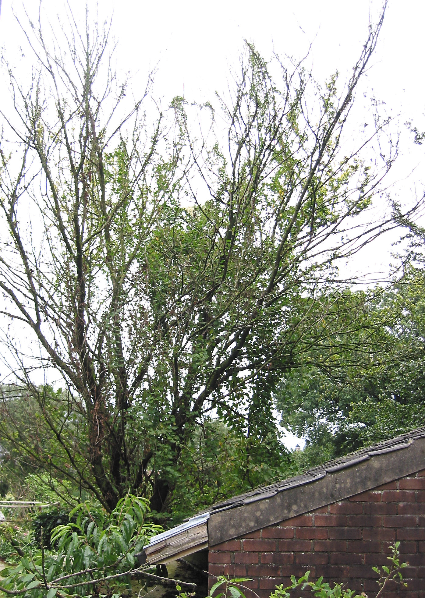 (nl: Iepziekte bij goudiep) Ophiostoma ulmi on Ulmus hollandica 'Wredei'